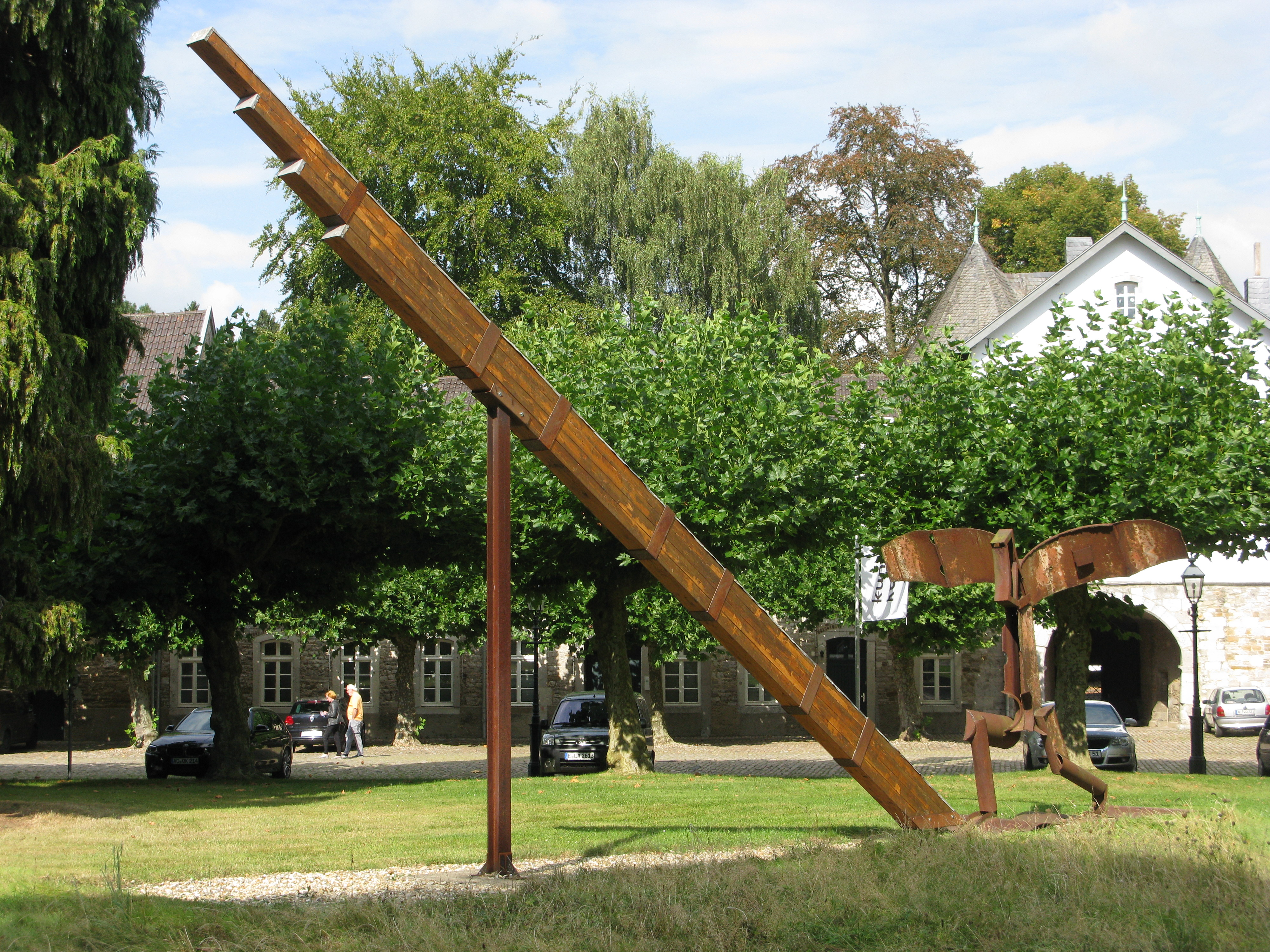 (Aachen-) Kornelimünster; Kunsthaus NRW; Kunstwerk "Startbahn für Beflügelte" von Manfred O. Ott 1985 / 2002; vorderer Garten neben dem Ehrenhof rechts